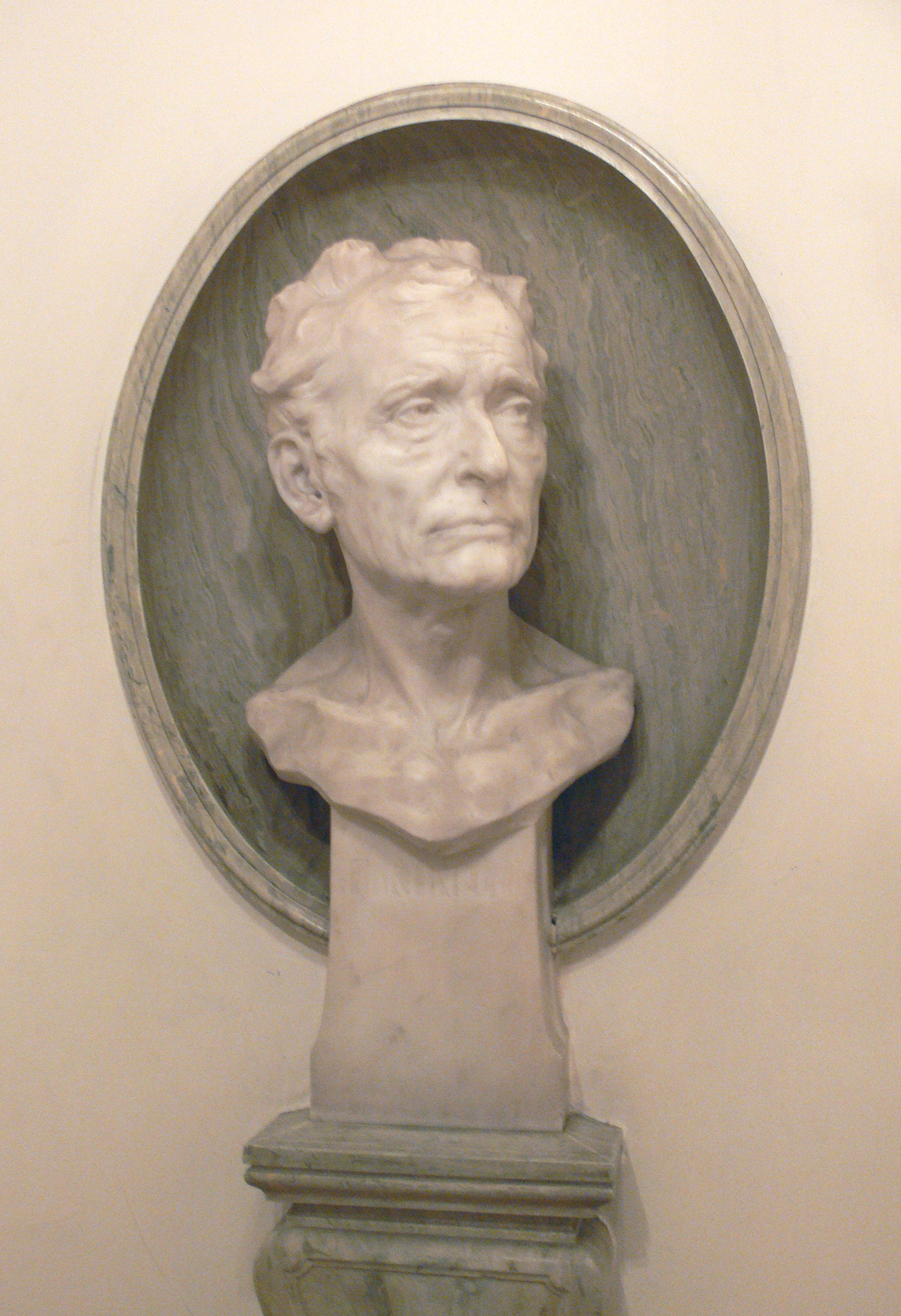 Büste Karl von Marinelli, Bildhauer: Johann Scherpe Wien, Volkstheater